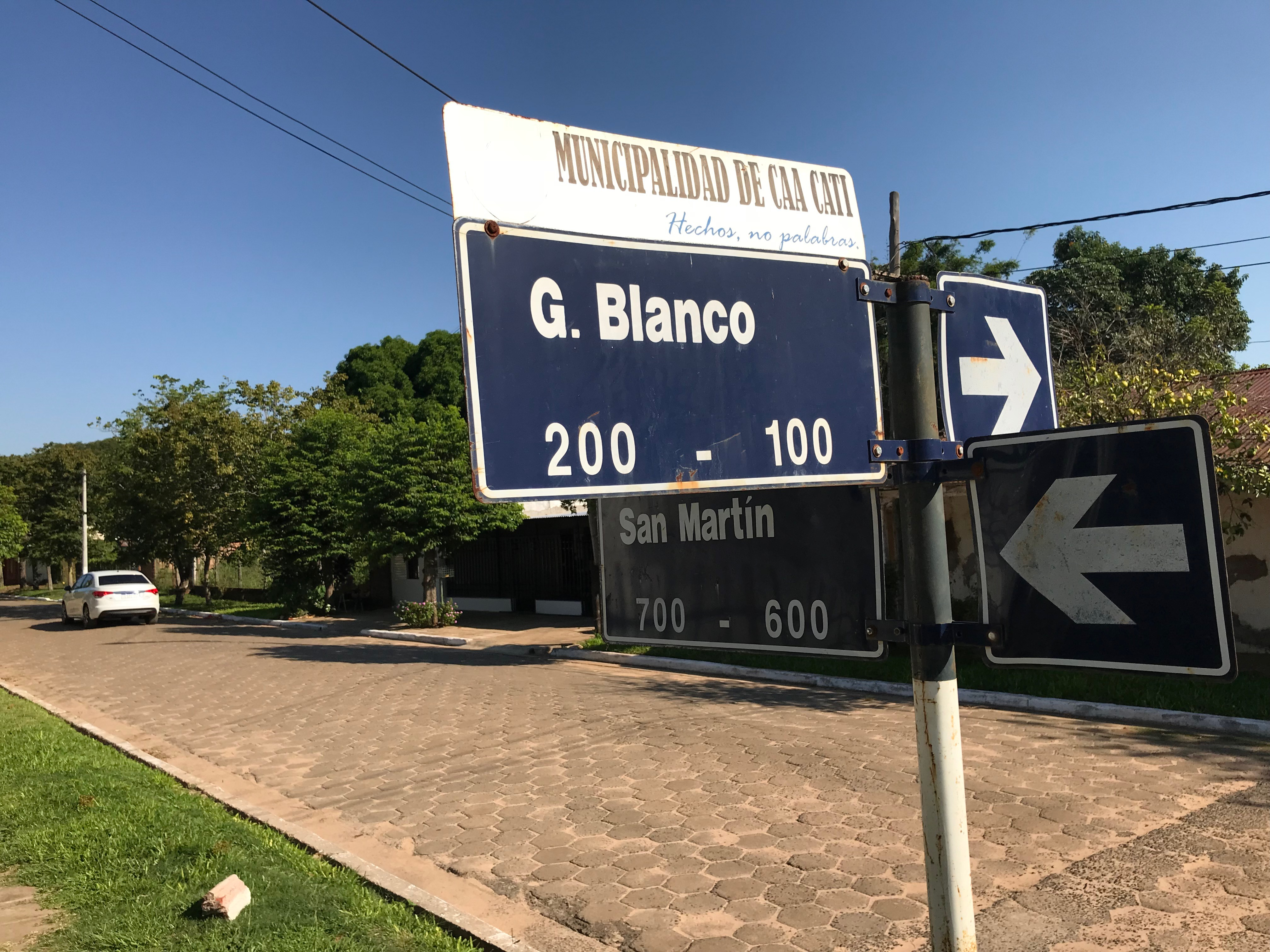 Señalética vial de la Calle Gervasio Blanco, en Caá Catí, Corrientes, Argentina.